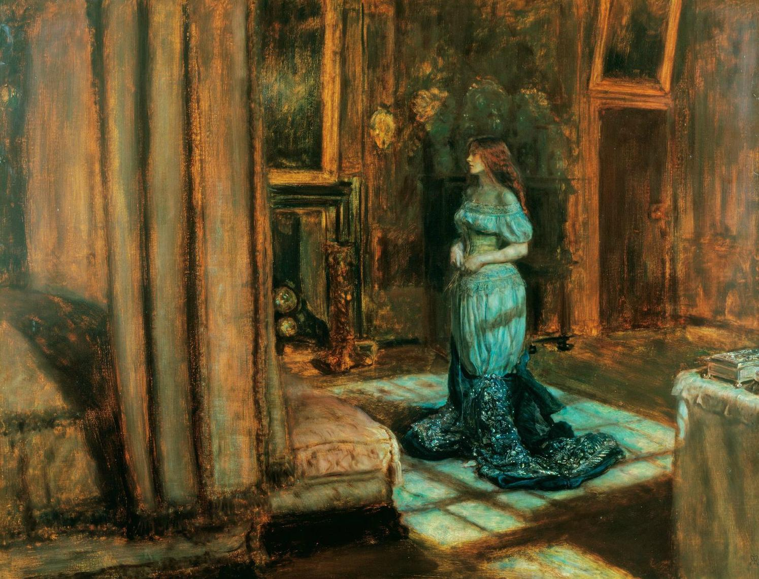 The Eve of St Agnes (1863) (By John Everett Millais